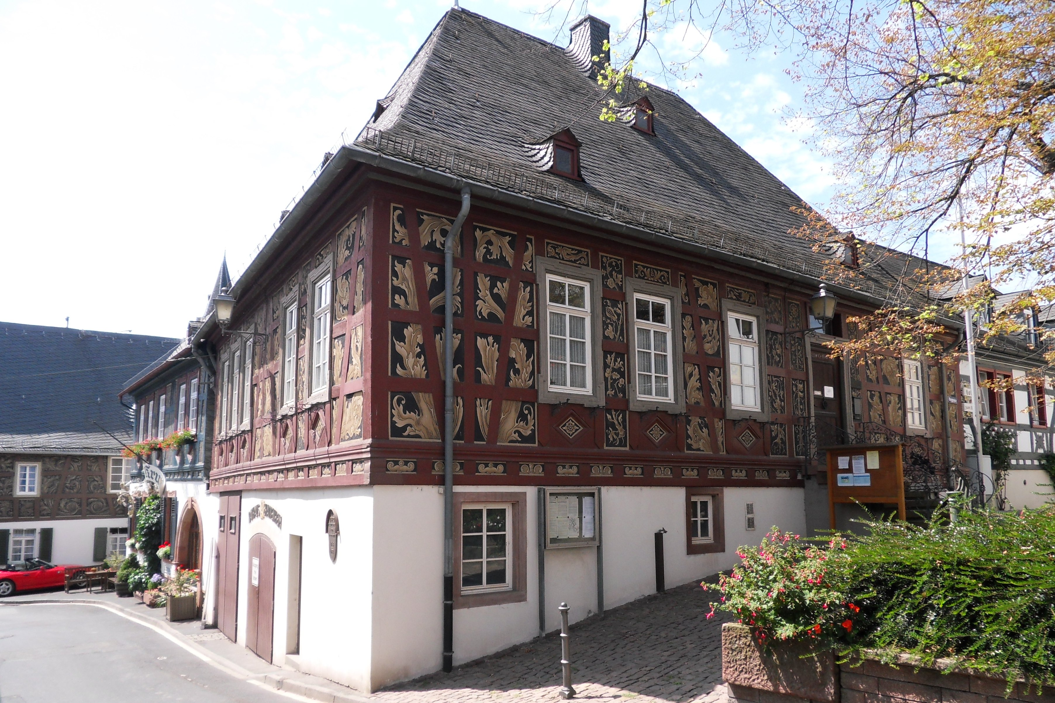 Rathaus in Hattenheim im Rheingau, Blick von Osten